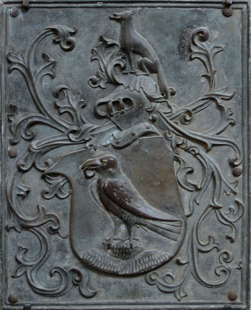 Wappen der Familie v. Trotha, Dom zu Merseburg - Bronzetafel